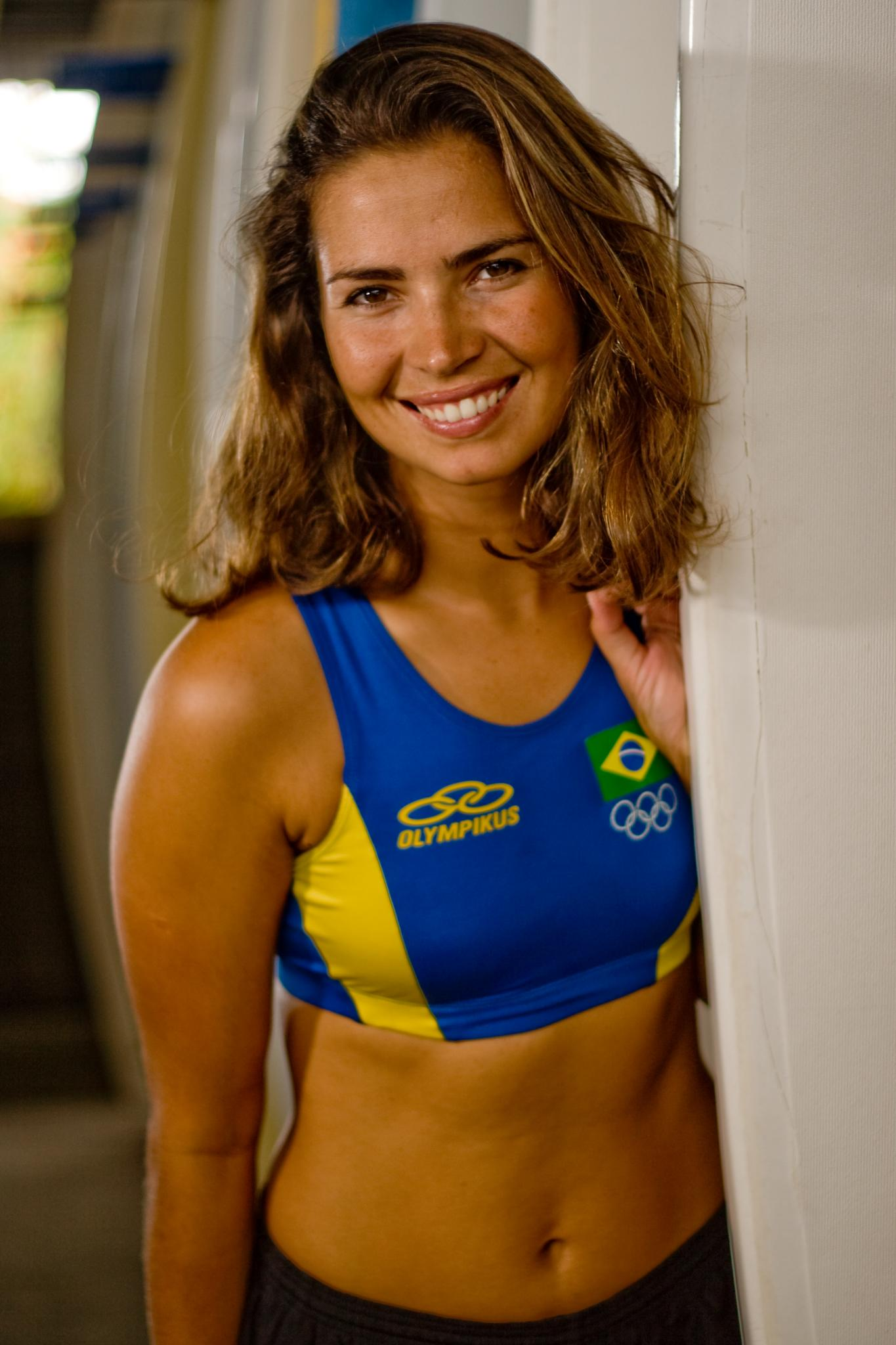 medalhista olímpica.